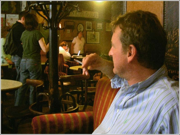 Ein Blick ins Cafè Hawelka